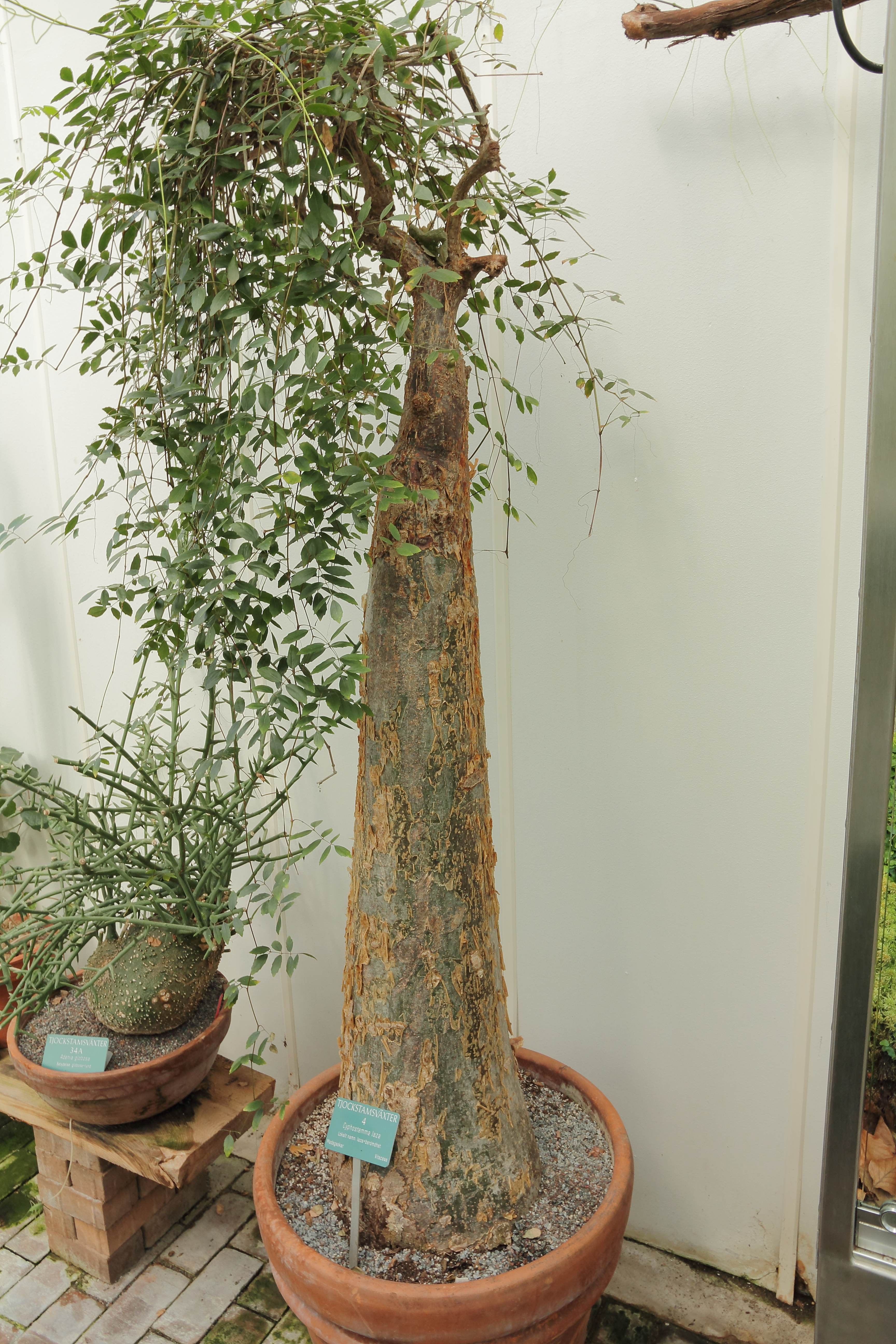 Cyphostemma laza i Bergianska trädgården.